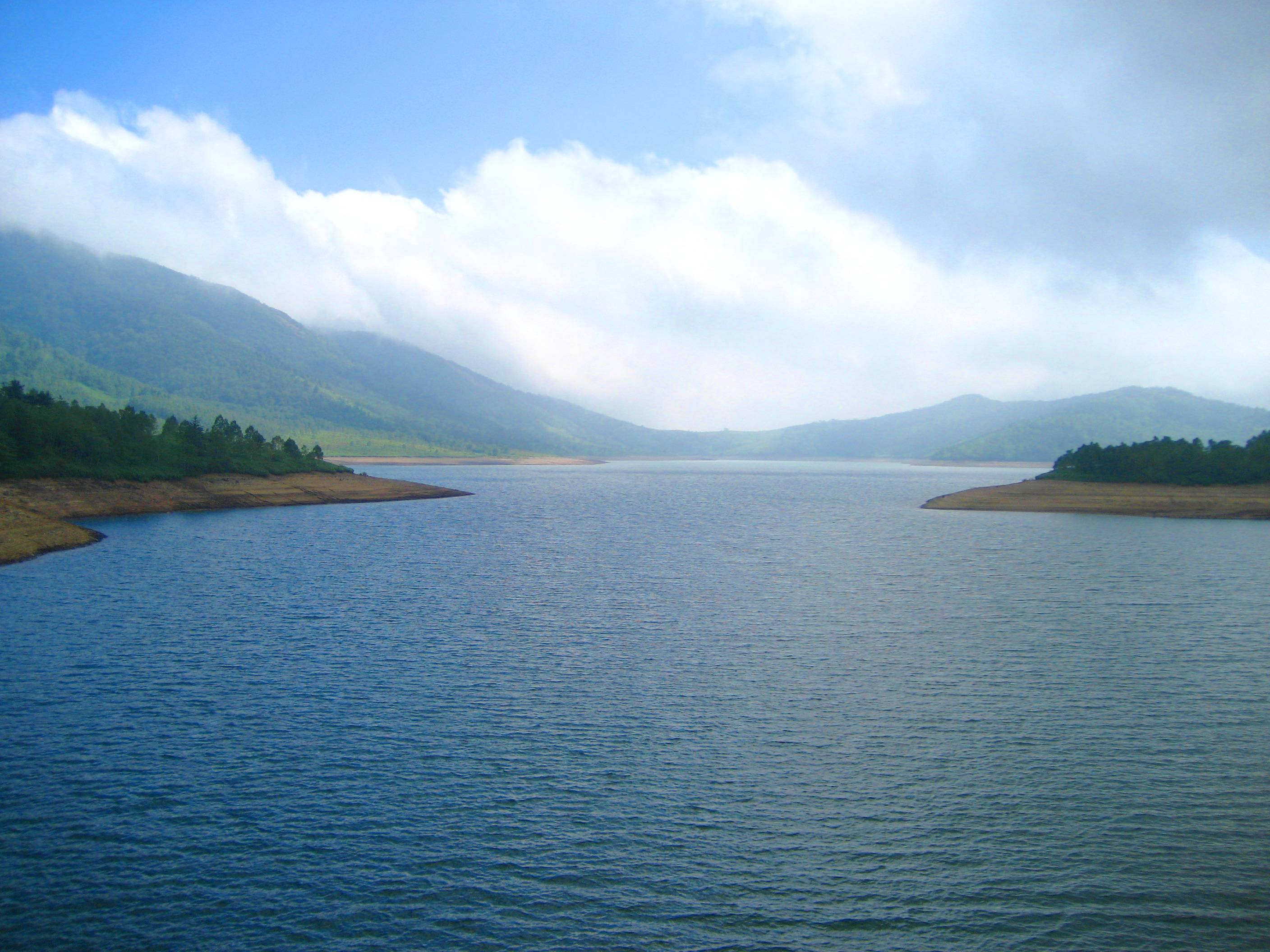 Nozori Dam (野反ダム) in Kuni village, Gunma prefecture, Japan.